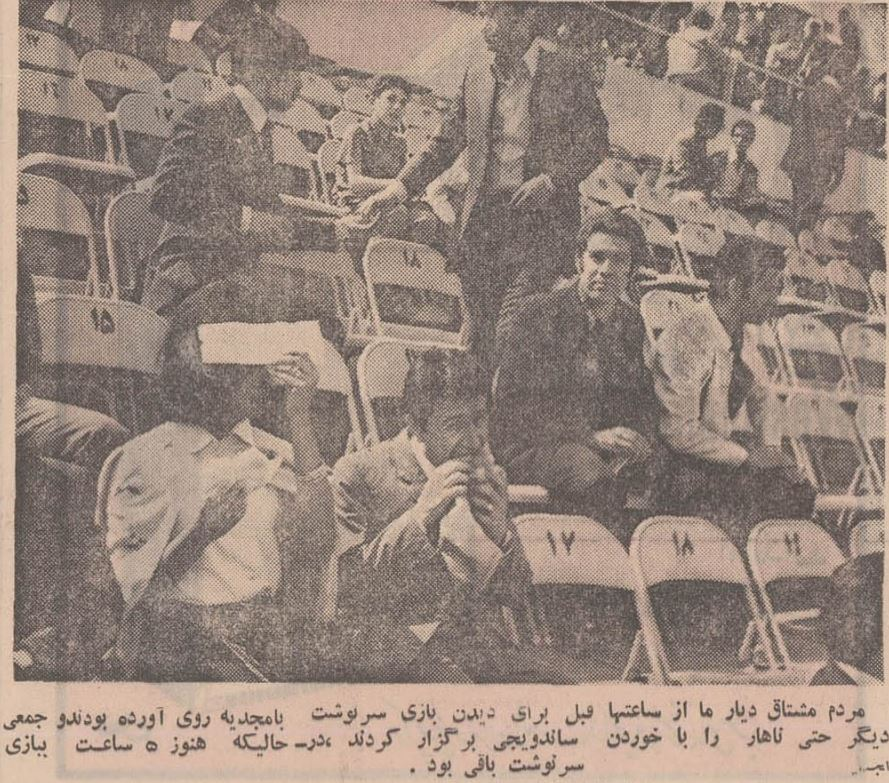 عکسی از تماشاگران بازی فینال جام باشگاههای آسیا در سال ۱۳۴۹ در امجدیه تهران